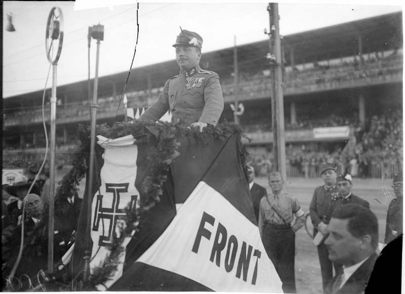 Kanzler in Kaiserjäger-Uniform als Redner bei einer Veranstaltung der Vaterländischen Front auf dem Wiener Trabrennplatz.